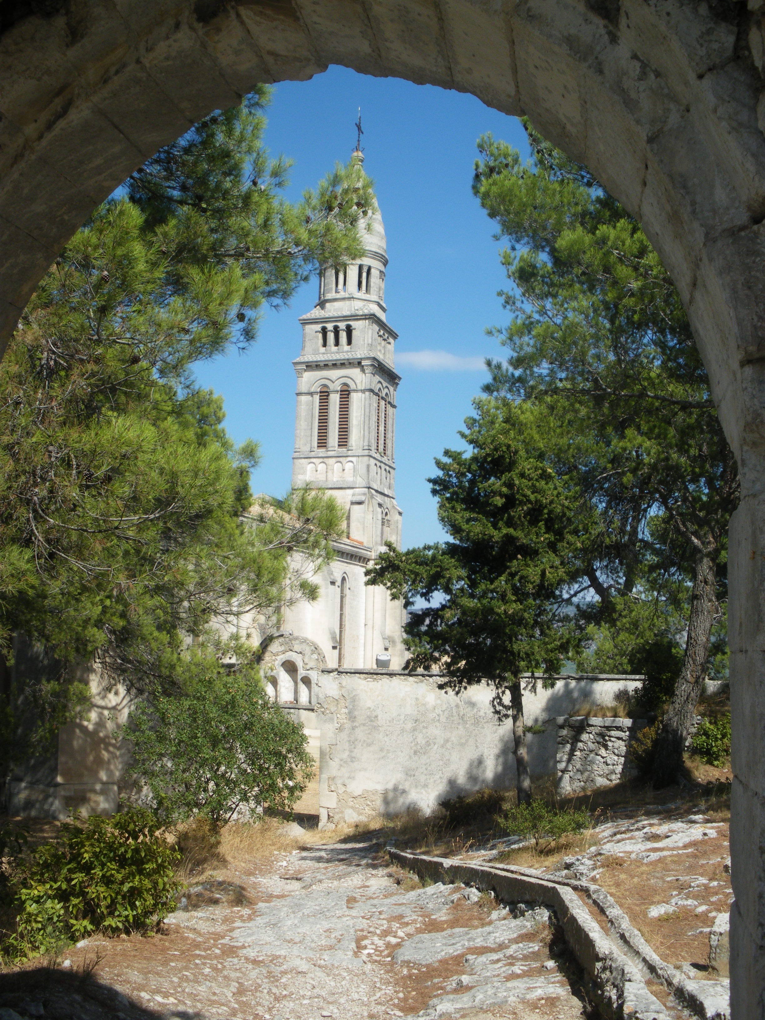 Notre Dame de Beauregard, Orgon, Bouche du Rhone, France